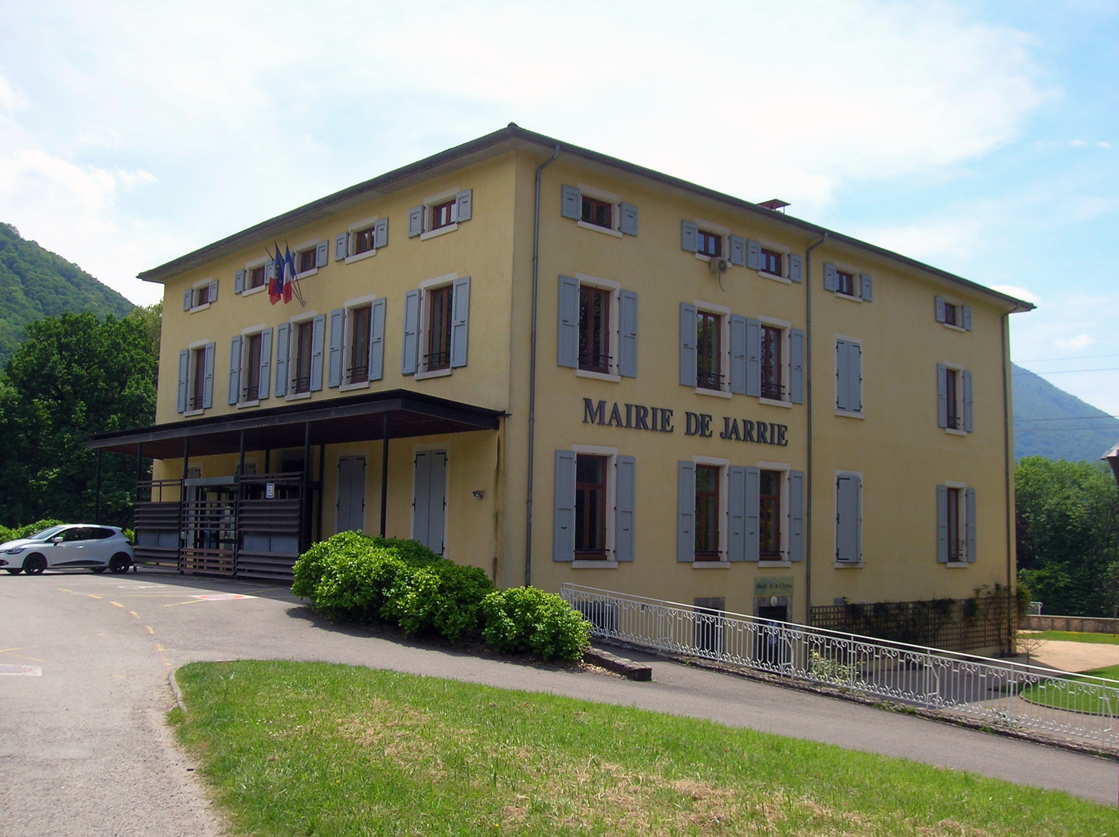 Clos Jouvin, Jarrie, Isère, France.